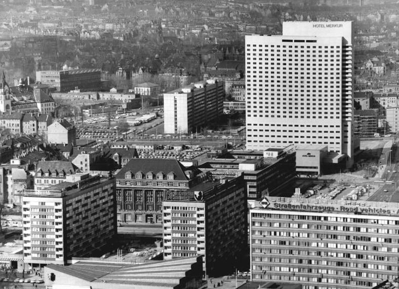 Leipzig, Hotel "Merkur" ADN-ZB 9.9.1981 DDR Eine Anheimlichkeit mehr in der Messestadt Leipzig ...ist das 5-Sterne-Hotel "Merkur" in der Nähe des Hauptbahnhofes. Es wurde in 30 Monaten von japanischen Bauleuten fertiggestellt. Hinter der sachlichen Fassade verbirgt sich, was man von solch einem Haus erwartet: 447 Zimmer, ein Bankett- und Kongreßzentrum mit separater Empfangshalle, das mit seinen unterschiedlichen Raumvarianten Platz für 50 bis 350 Personen bietet. Mit der Benennung der Salons nach Goethe, Klinger, Leibniz, Bach und Gartenberg wird an die Verdienste erinnert, die sich diese bedeutensten Persönlichkeiten aus der Deutschen Geschichte um die Entwicklung der 800jährigen Messestadt erworben haben. Zwölf Restaurants, Clubs und Bars sorgen für das leibliche Wohl des Gastes. Reporter: Kluge Copyright: ADN-Zentralbild Berlin-DDR